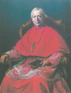 Cardinal Capecelatro di Castelpagano